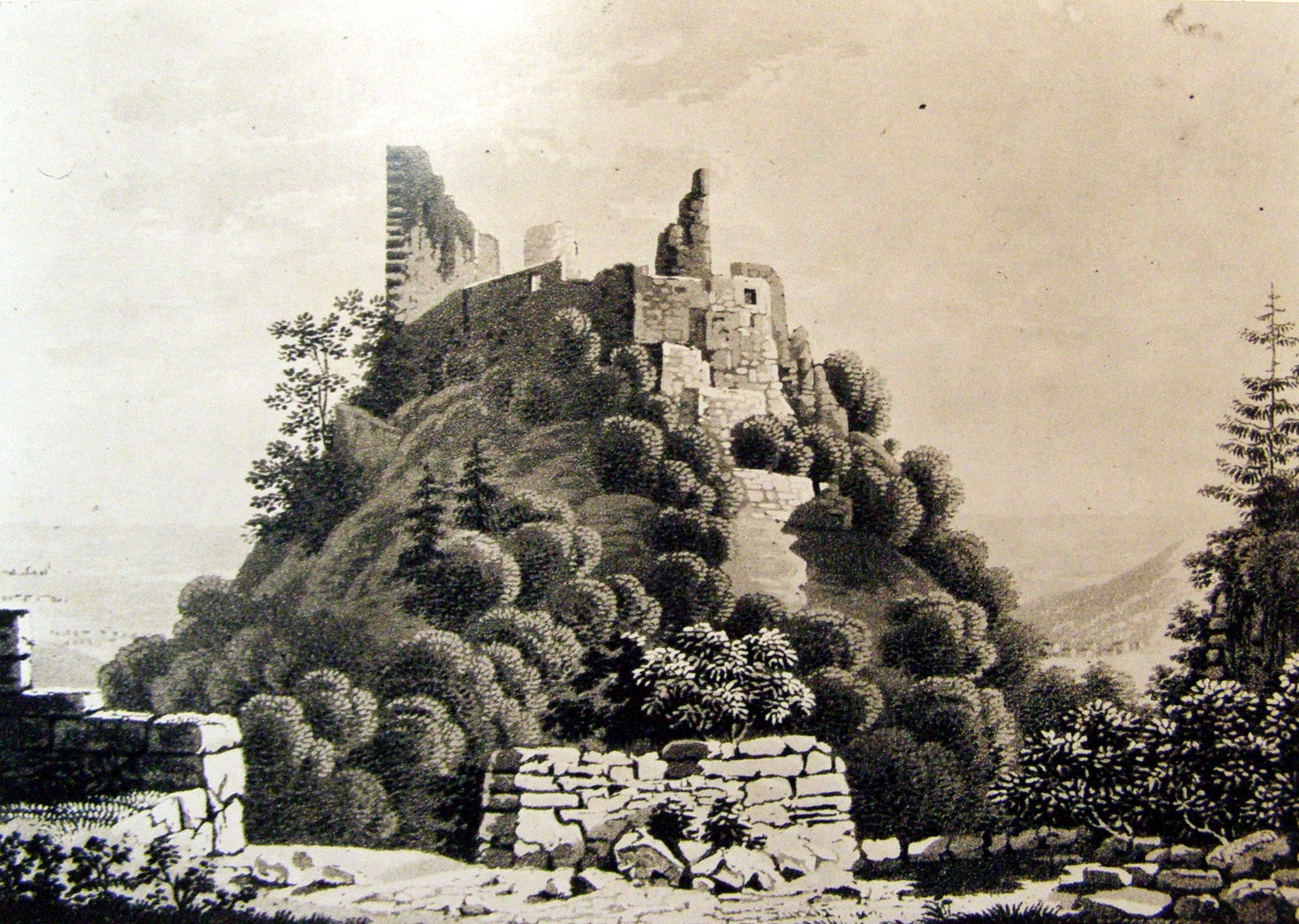 Zeichnung der Randenburg um 1820, J. J. Beck, Schaffhausen